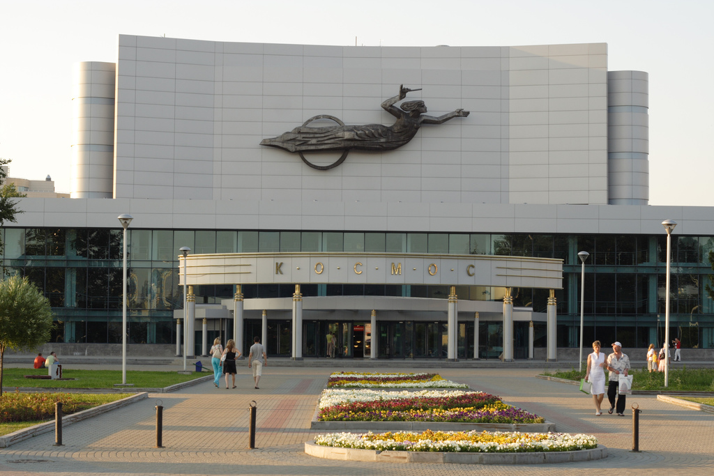 ККТ Космос